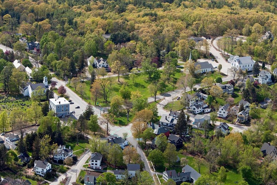 Harvard Common; Harvard, MA